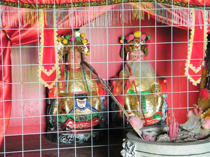 达濠青篮下尾福德庙福德老爷与福德老爷夫人像